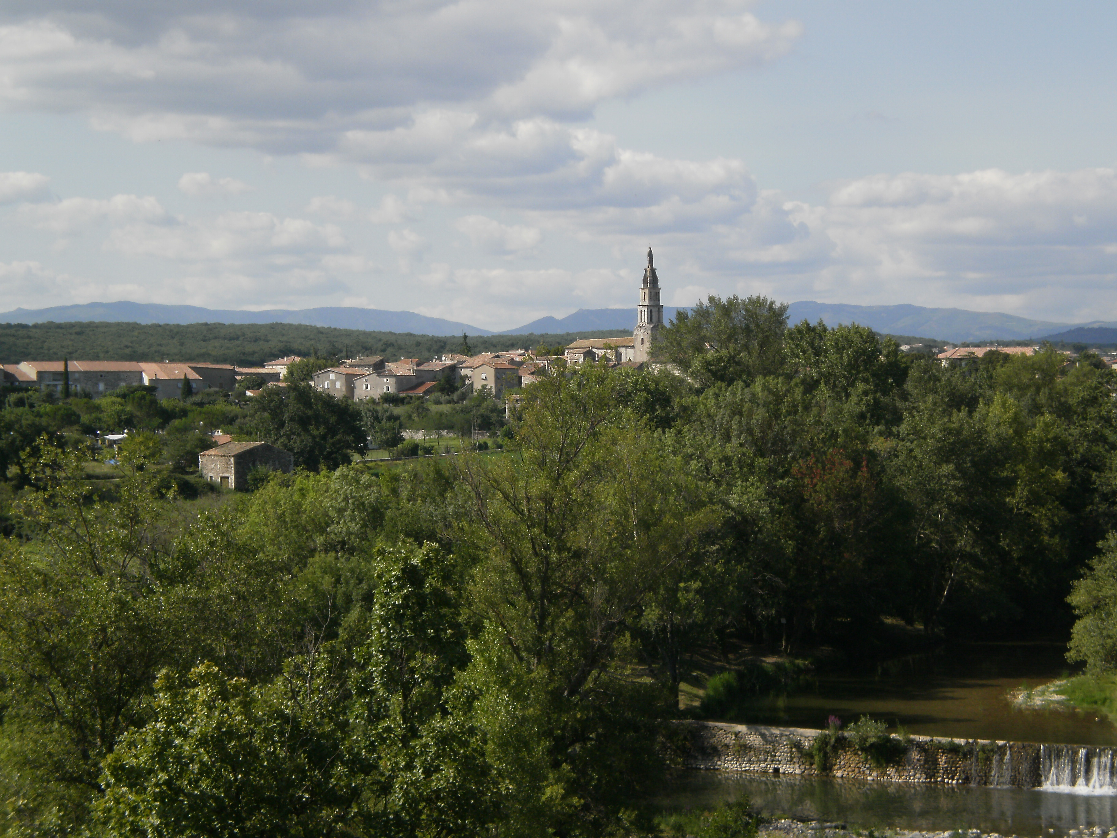 Photo prise le 5 août 2014 à 17h01